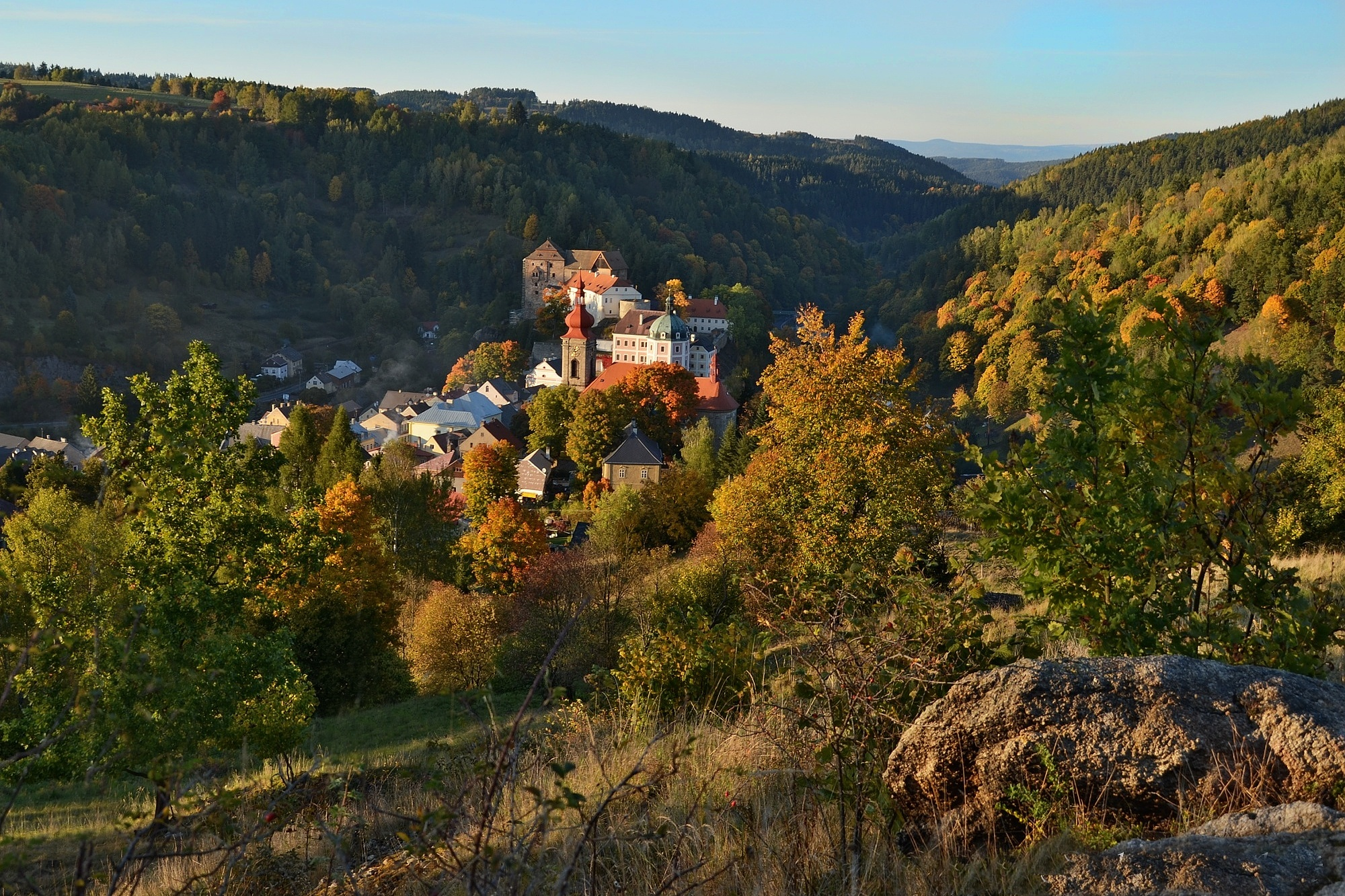 Hrad a zámek Bečov nad Teplou, Bečov nad Teplou 9, Bečov nad Teplou.